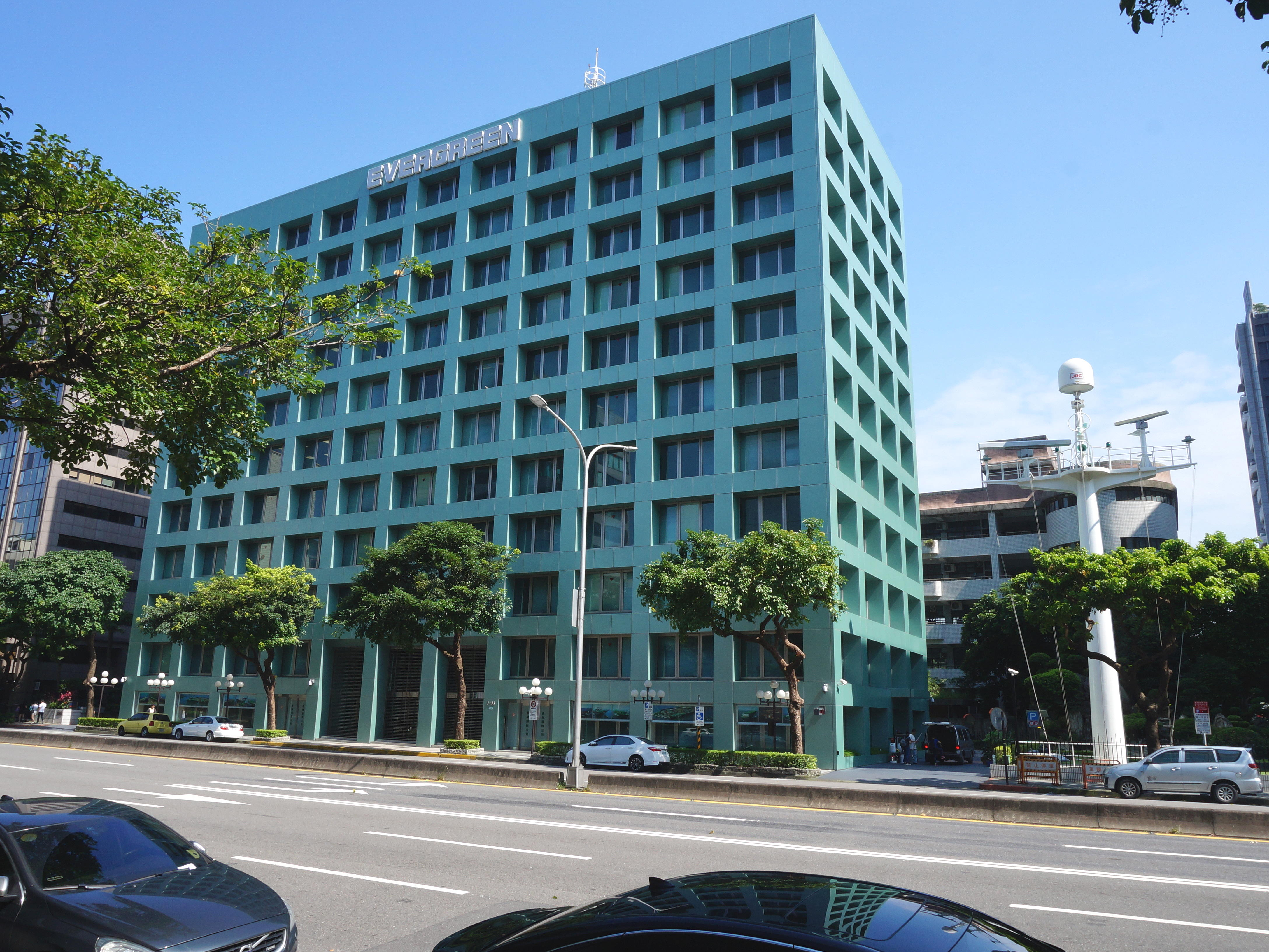 長榮海運大樓，地址：臺北市中山區民生東路二段166號。